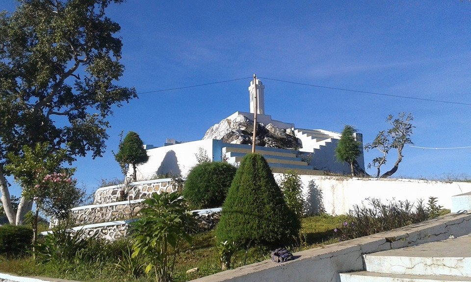 Ainaro